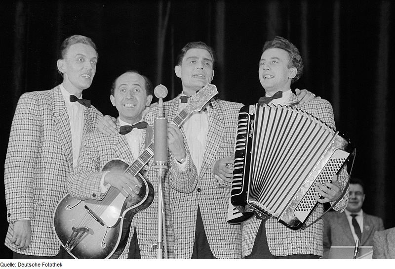 Original image description from the Deutsche Fotothek Das Ensemble "die Brummers" bei der Festivität zum 60jährigen Bestehen der Leipziger Volkszeitung